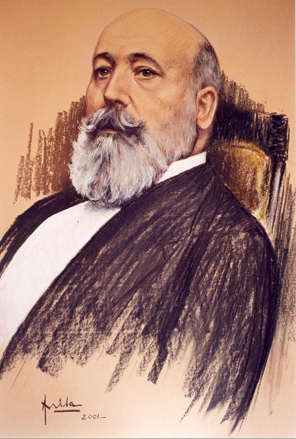 Presidente Dr. José Sanchís